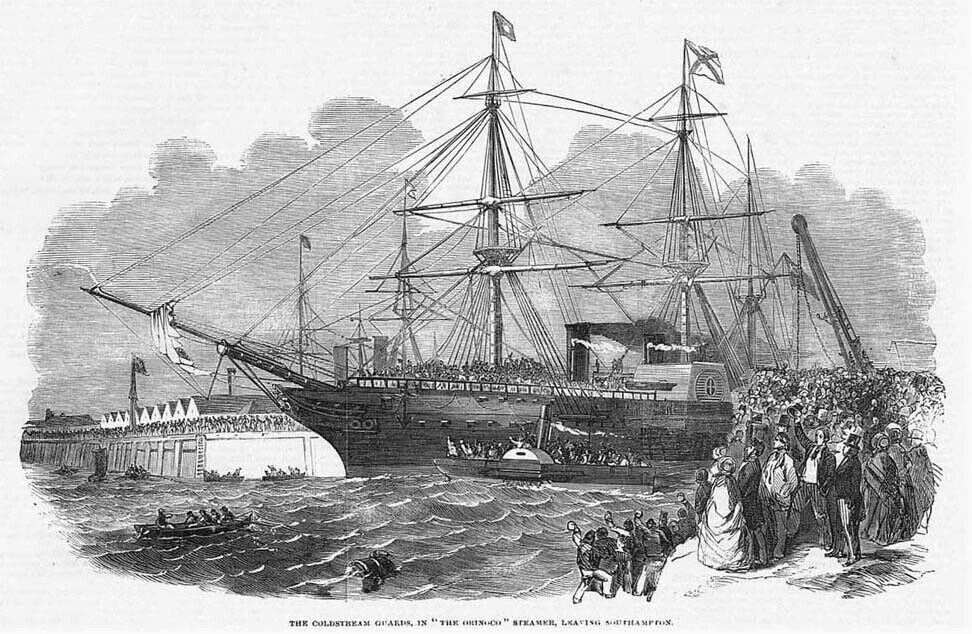 L'Orinoco, paquebot de la Royal Mail en partanbce pour la Guerre de Crimée (1854), dessin du Illustrated London News